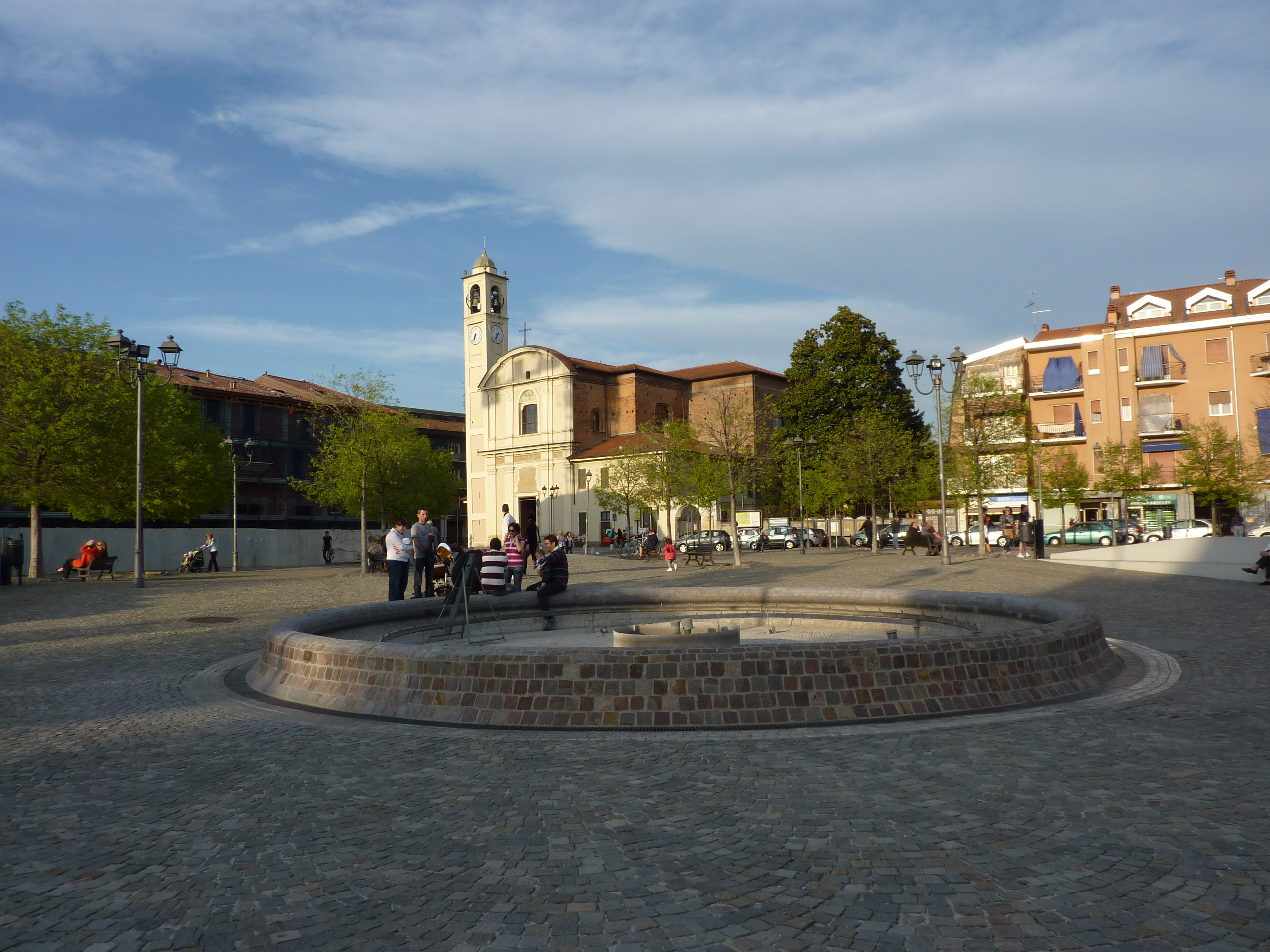 piazza vittorio veneto di vimodrone